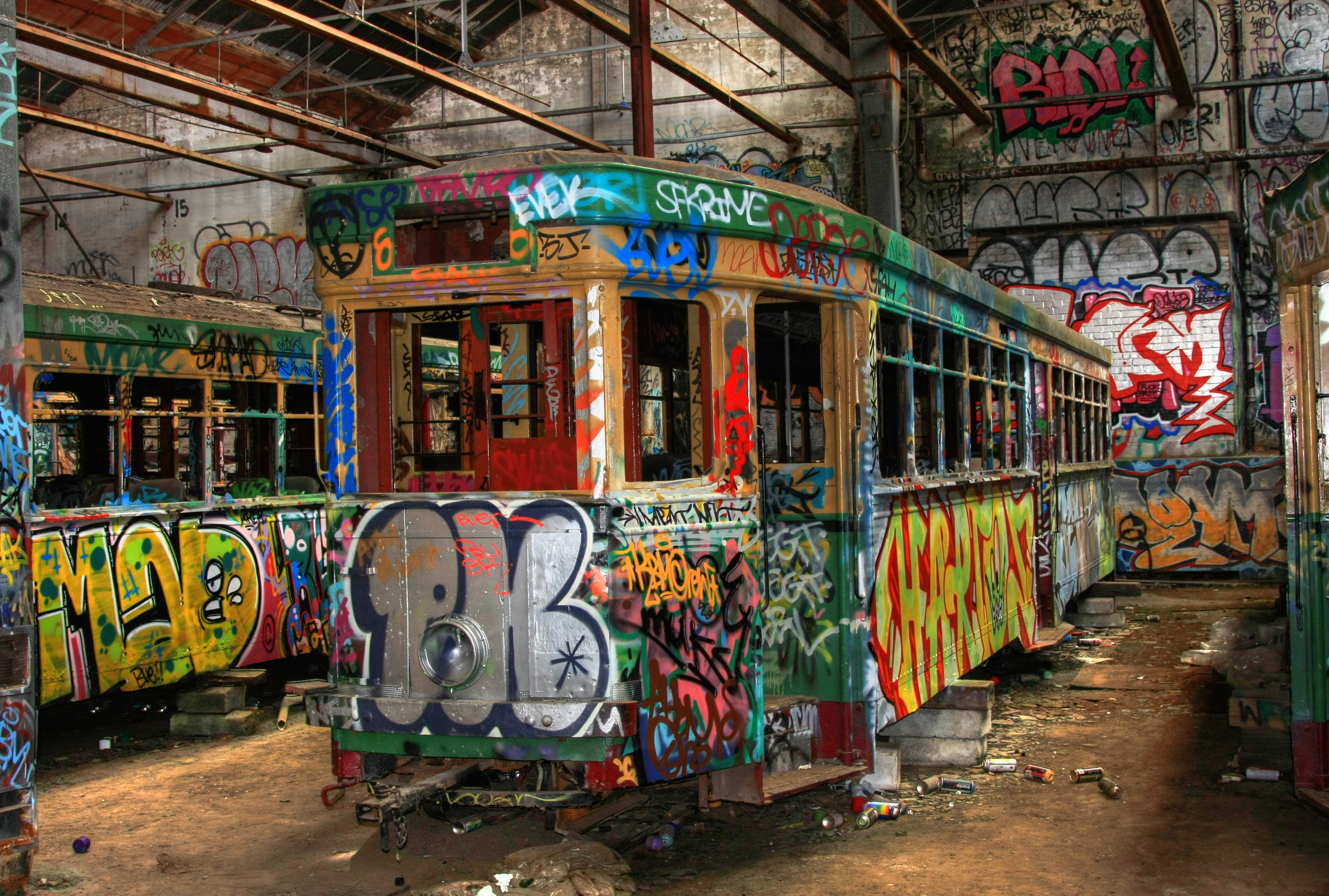 vandalised tram in Rozelle Depot